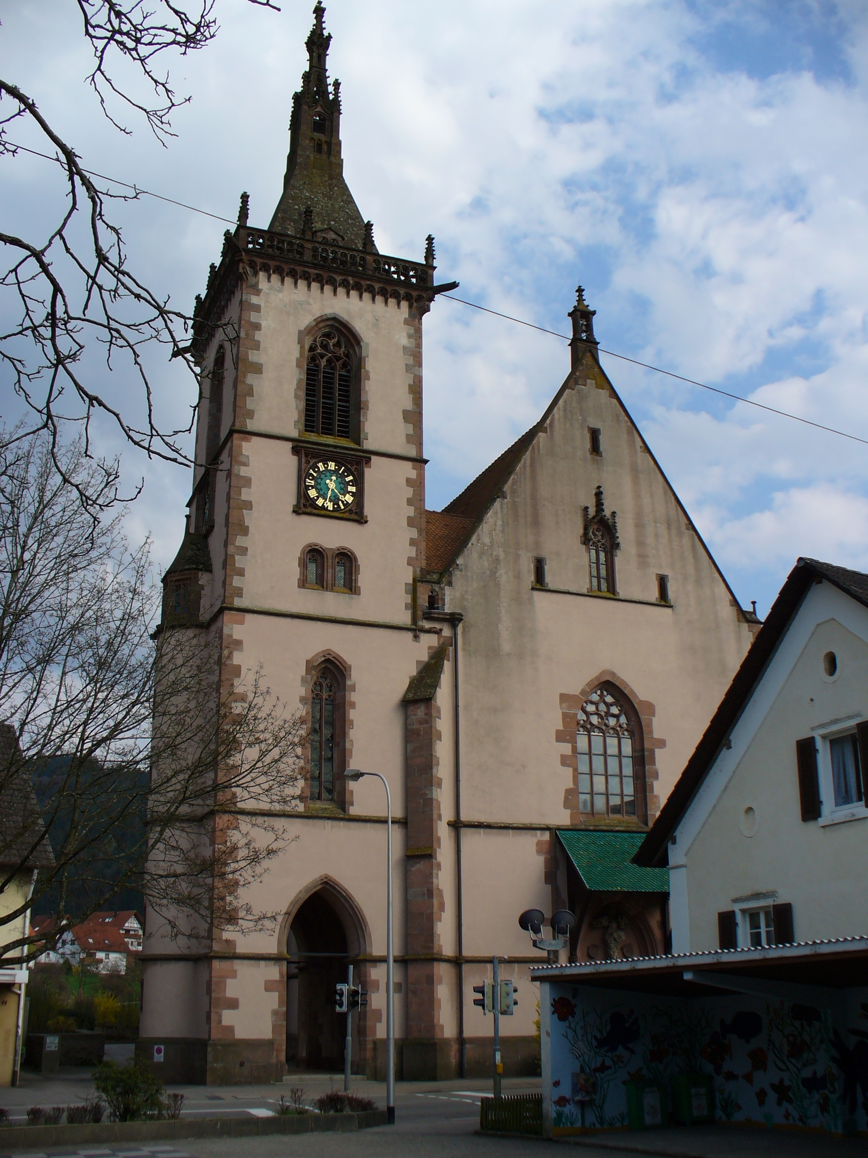 Beschreibung / description: Wallfahrtskirche "Maria Krönung" in Lautenbach, Deutschland / Pilgrimage church "Maria Krönung" at Lautenbach, Germany Quelle / source: selbst fotografiert am / self made at 03. April 2005 Fotograf / photographer: User:Kerish Lizenz / licence